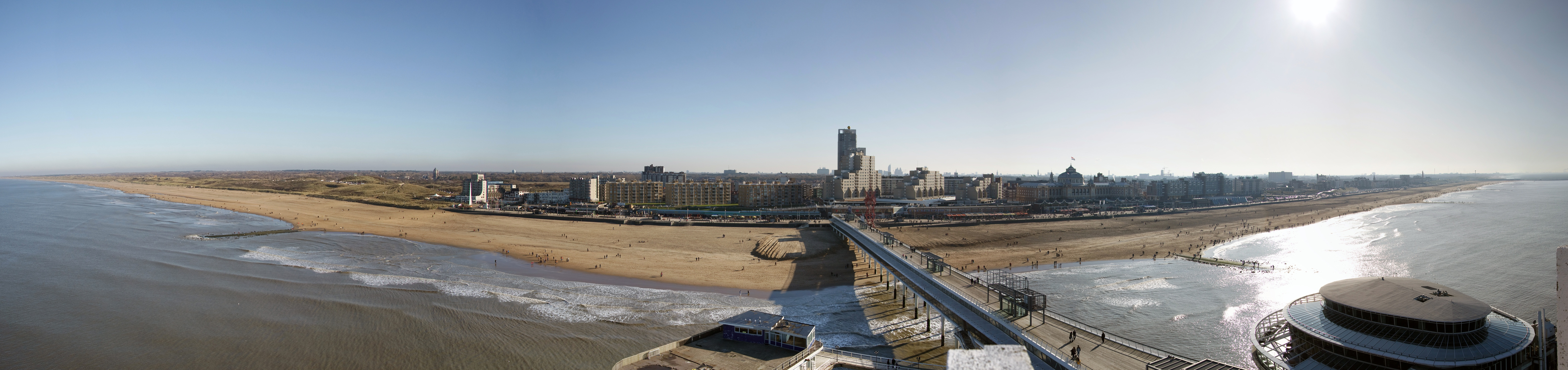 Panorama Scheveningen, Den Haag, NL - Größtes Seebad der Niederlande